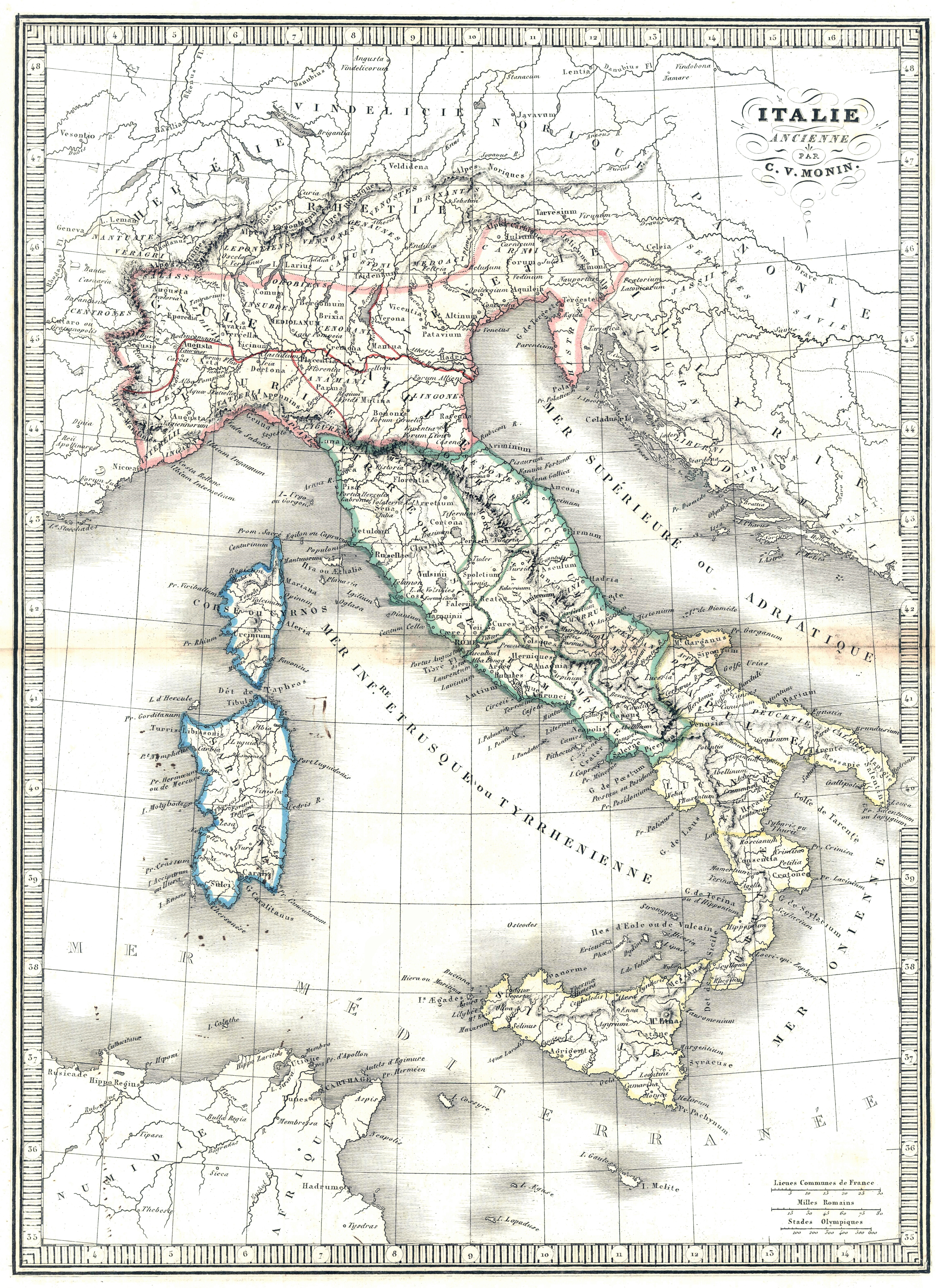 Italie ancienne par C. V. Monin.title QS:P1476,fr:"Italie ancienne par C. V. Monin." label QS:Lfr,"Italie ancienne par C. V. Monin."